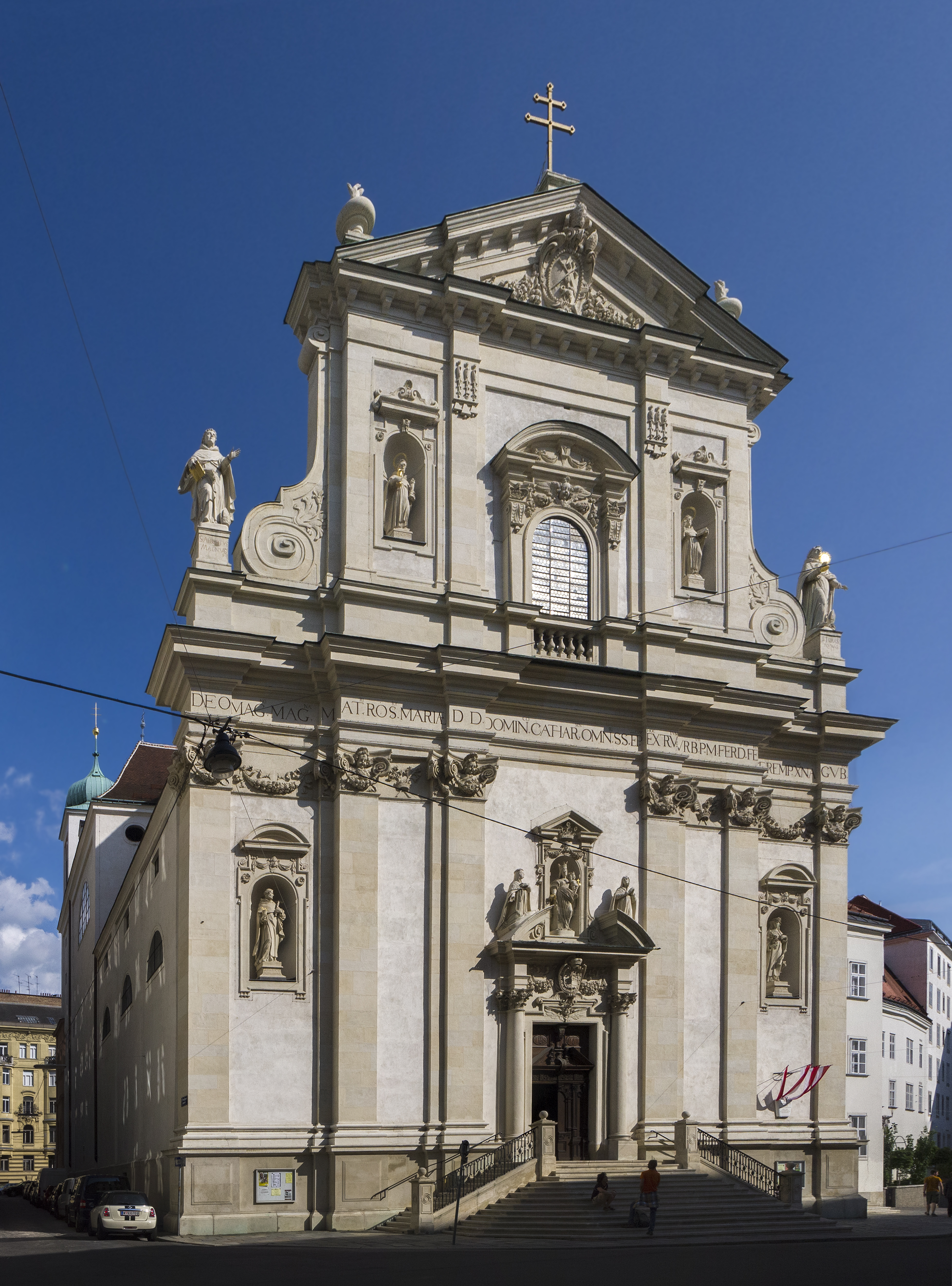 Dominikanerkirche Sancta Maria Rotunda mit Dominikanerkonvent